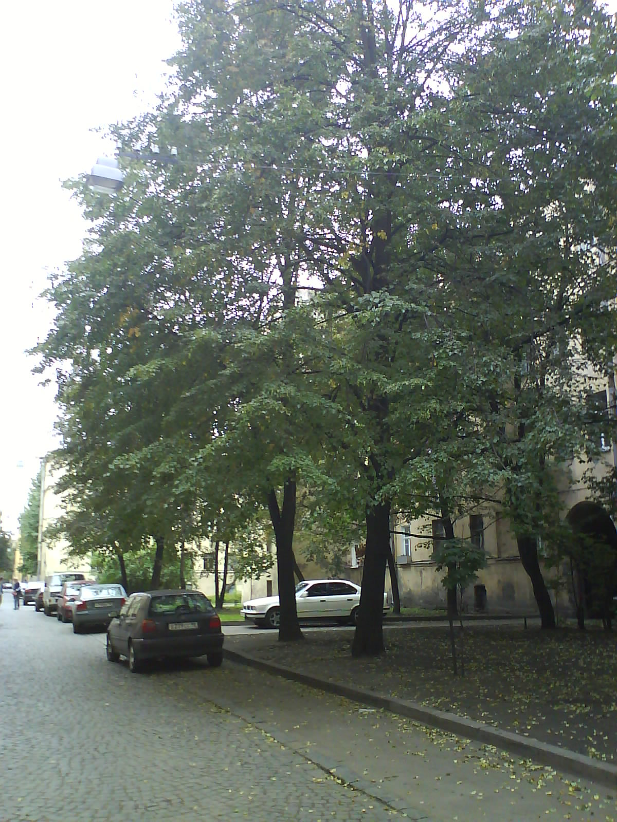 Repina Street in St.-Peterterburg (Russia)